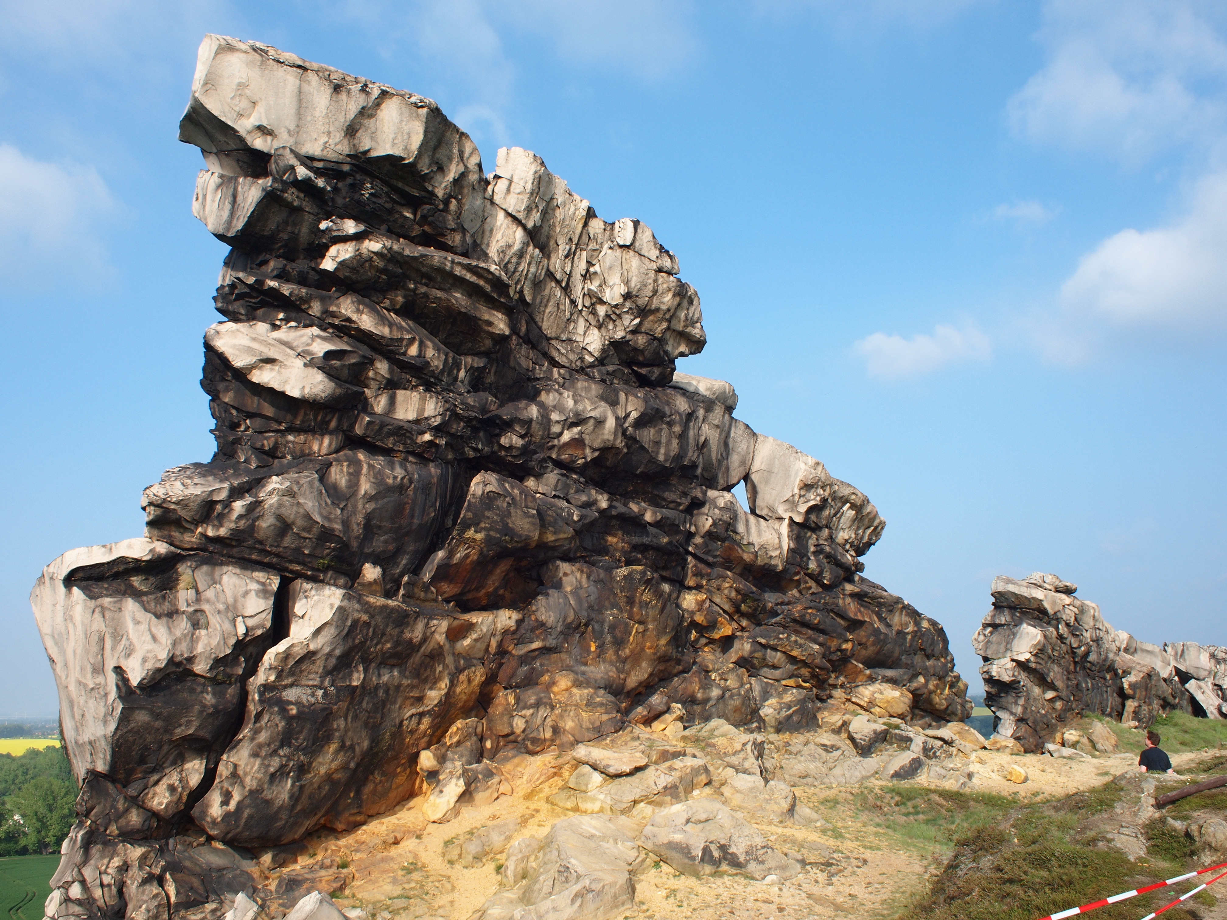 An der Teufelsmauer (Landkreis Harz, Sachsen-Anhalt)